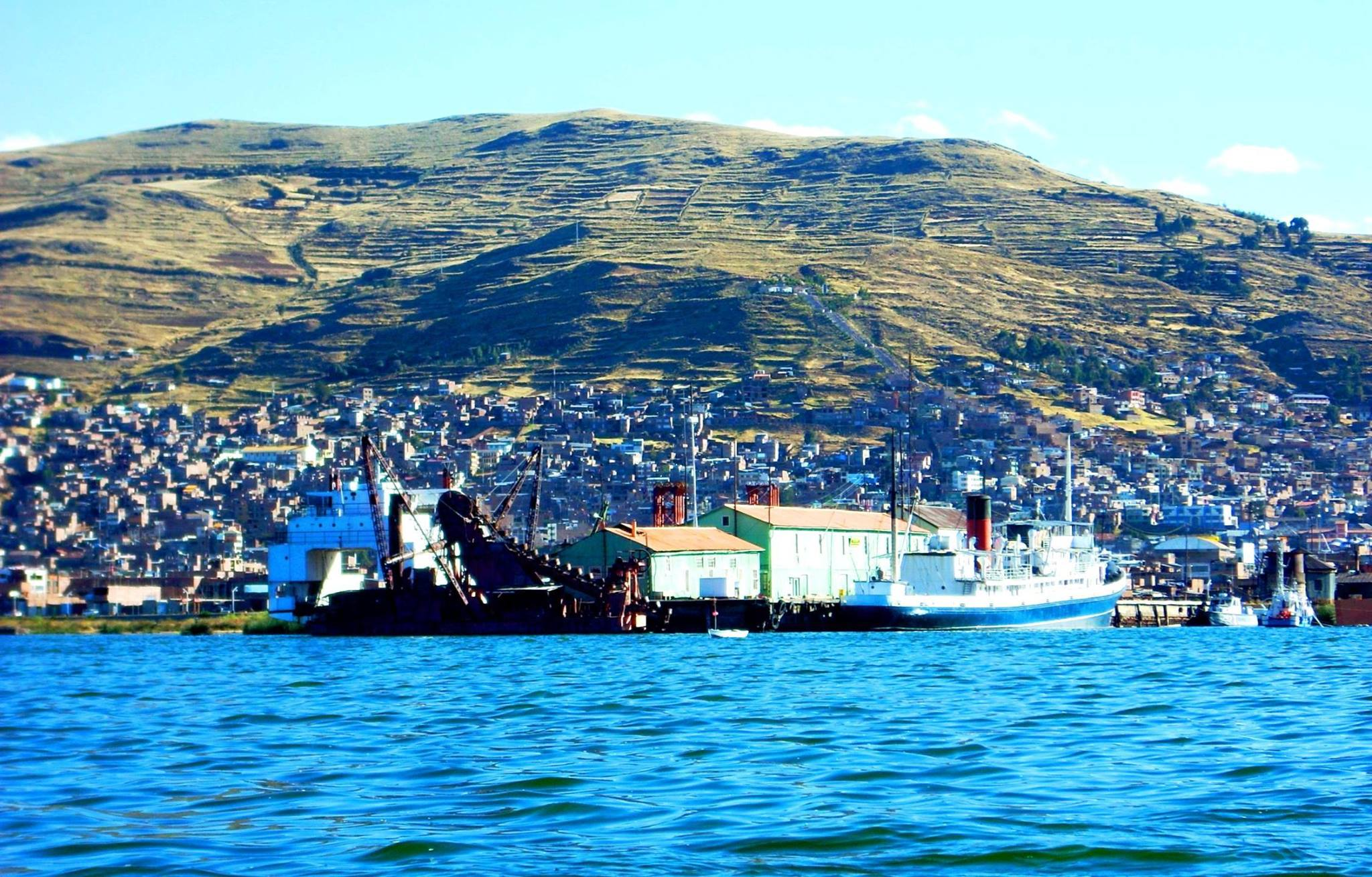 Platería Puno Peru